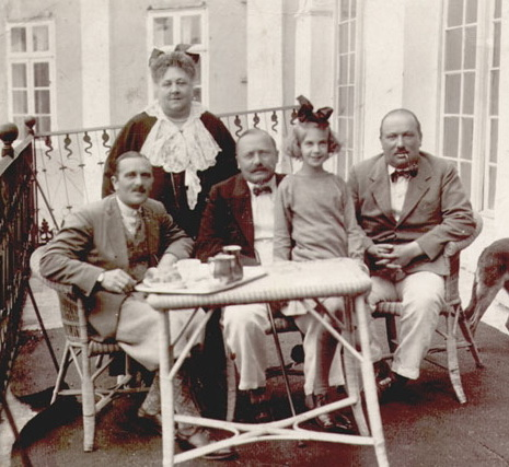 На террасе Несвижского замка: Мария Роза Радзивилл с сыновьями Леоном, Альбрехтом, Каролем (слева направо) и внучкой Эльжбетой